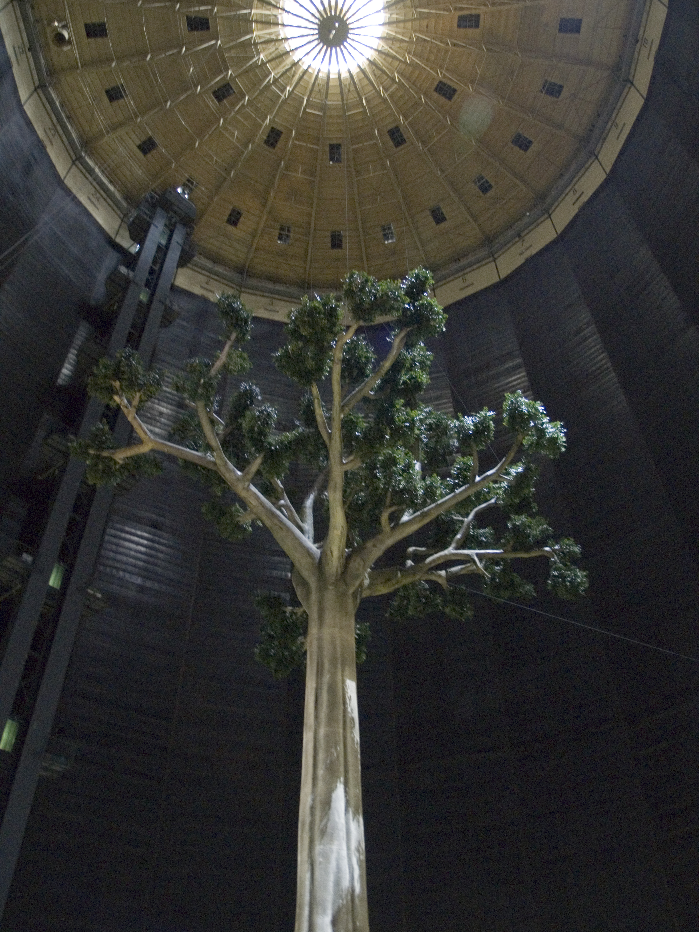 Северный Рейн - Вестфалия, Оберхаузен. Газометр